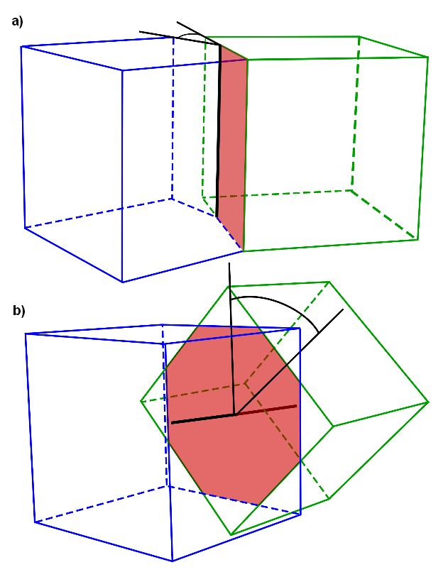 Schematyczne przedstawienie granic ziaren małego kąta: a) granica nachylona b) granica skręcona